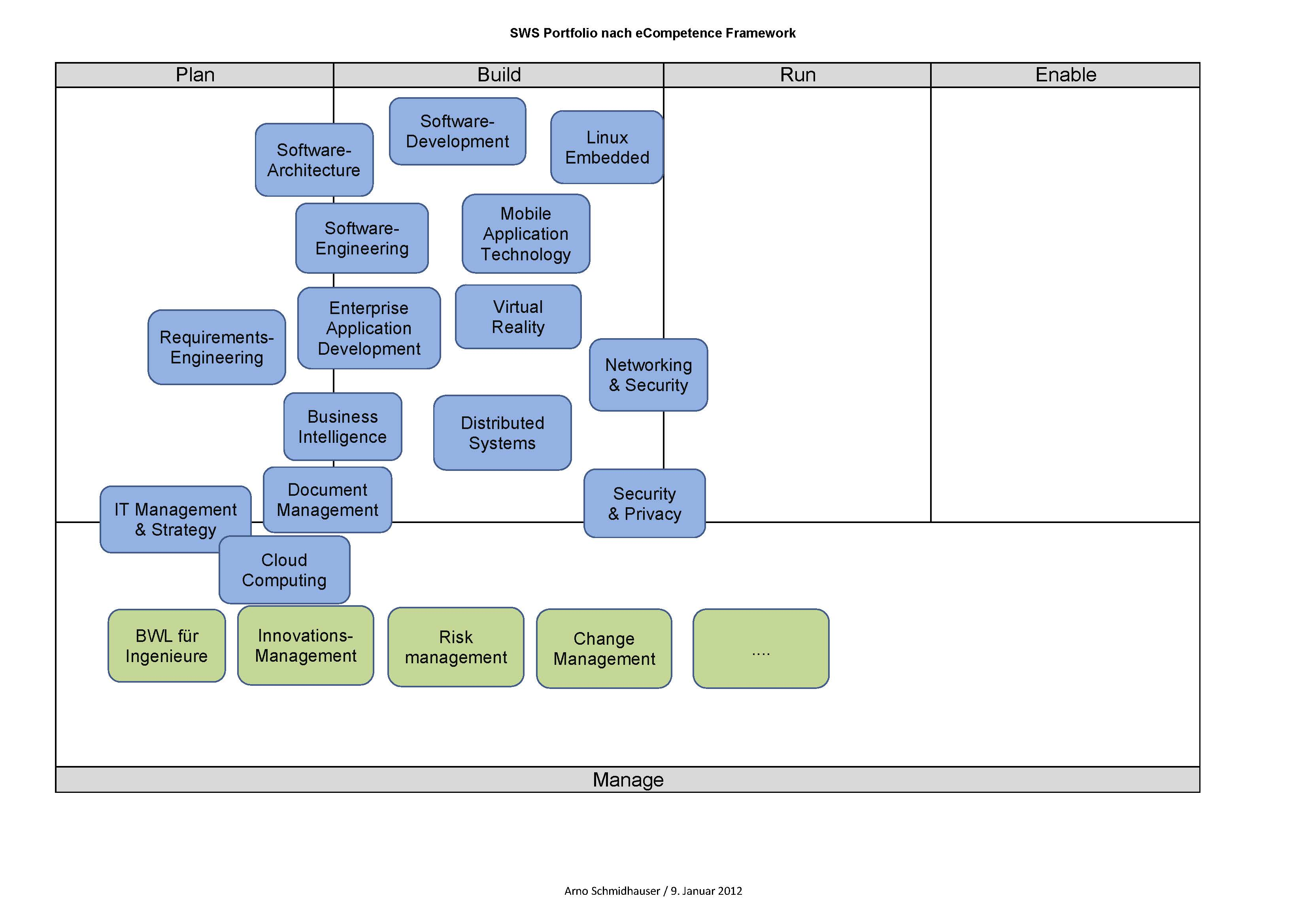 Die einzelnen Module (CAS) der SWS nach der Plan-Build-Run-Enable-Manage Metapher